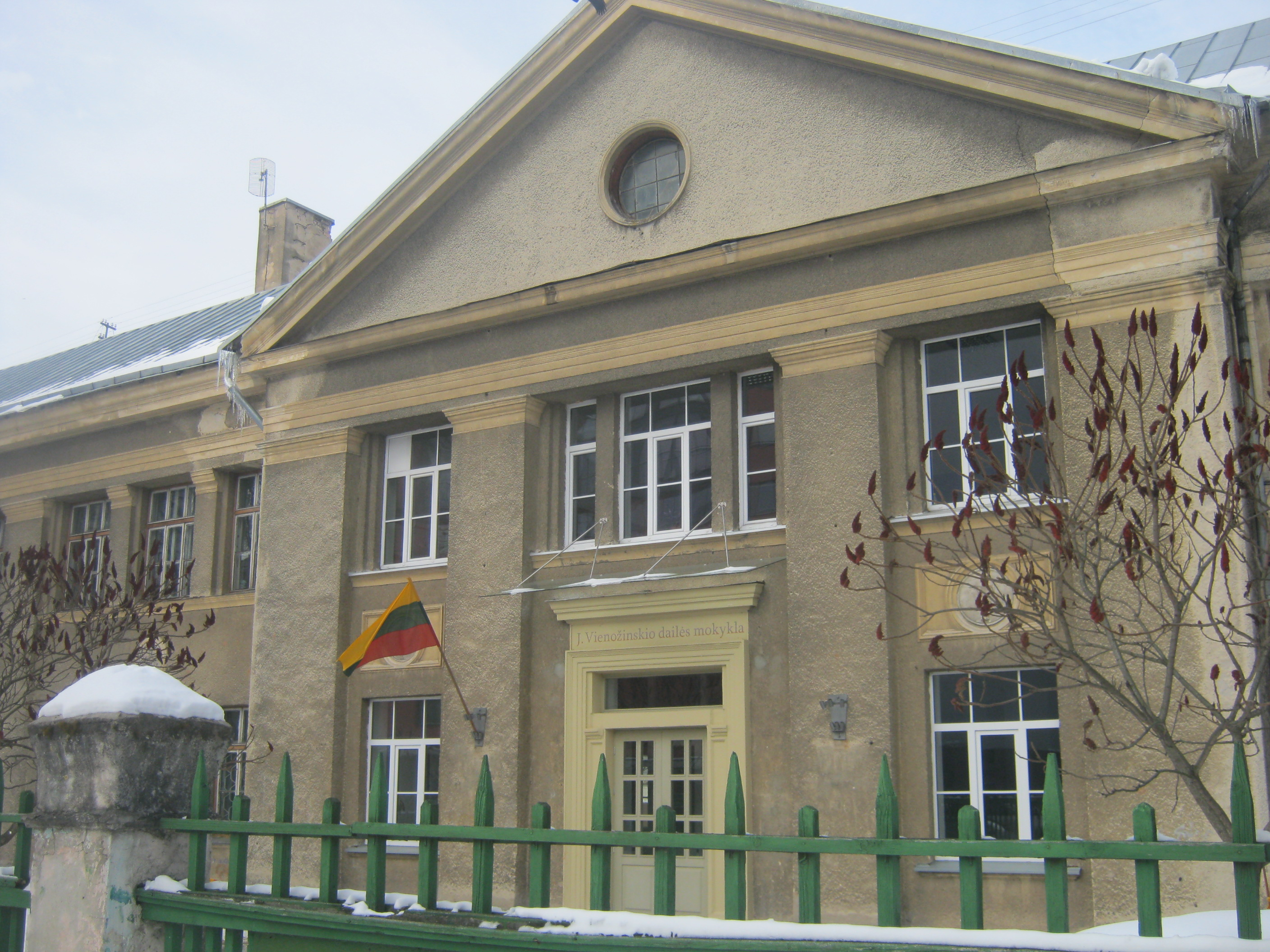 Vilniaus Justino Vienožinskio dailės mokykla